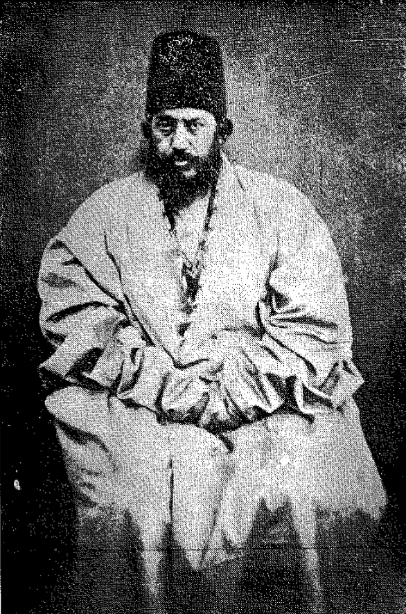 میرزا محمود وزیر، از دولتمردان دوران قاجار